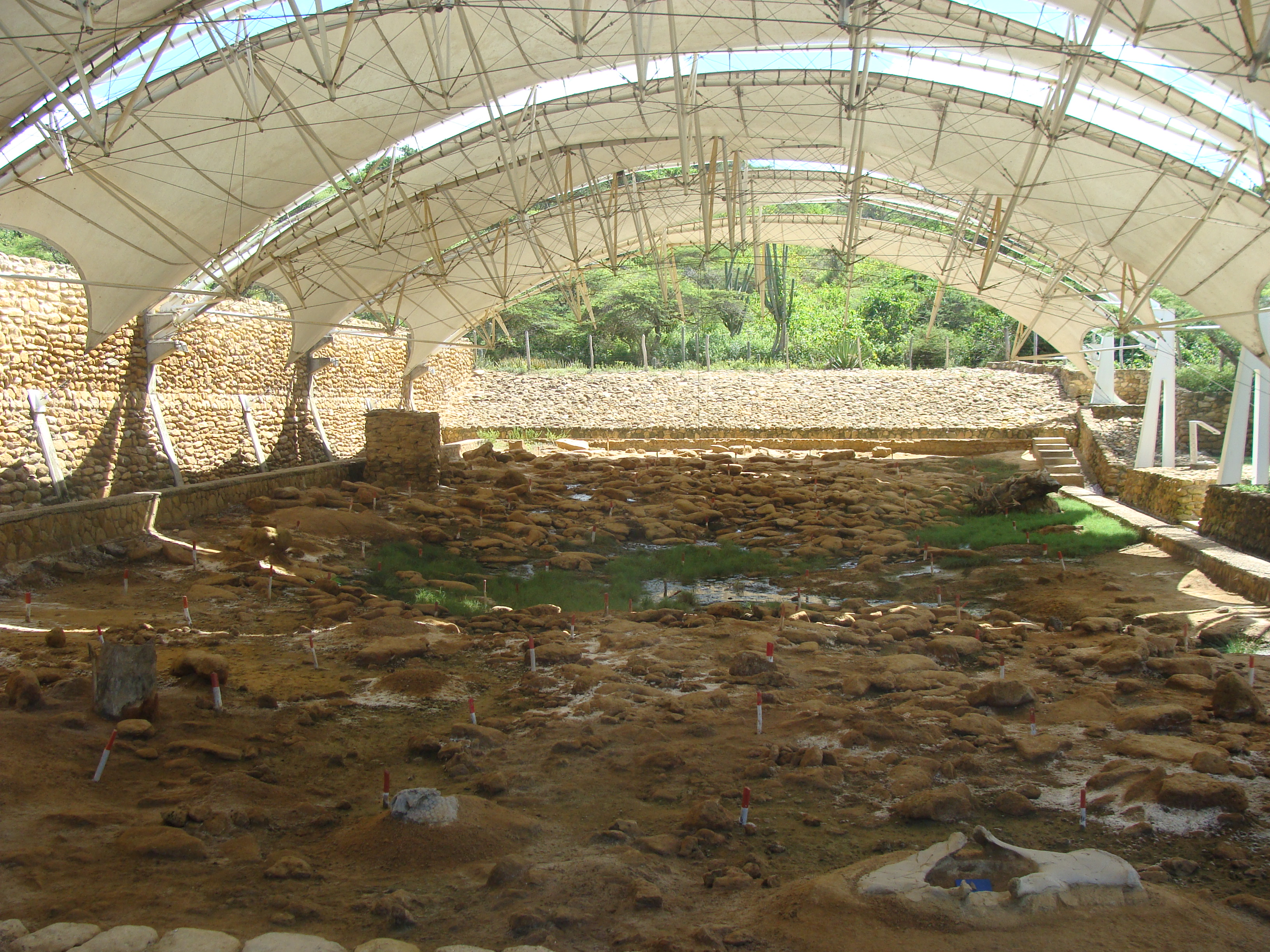 Parque Arqueológico y Paleontológico Taima Taima, Estado Falcón Venezuela